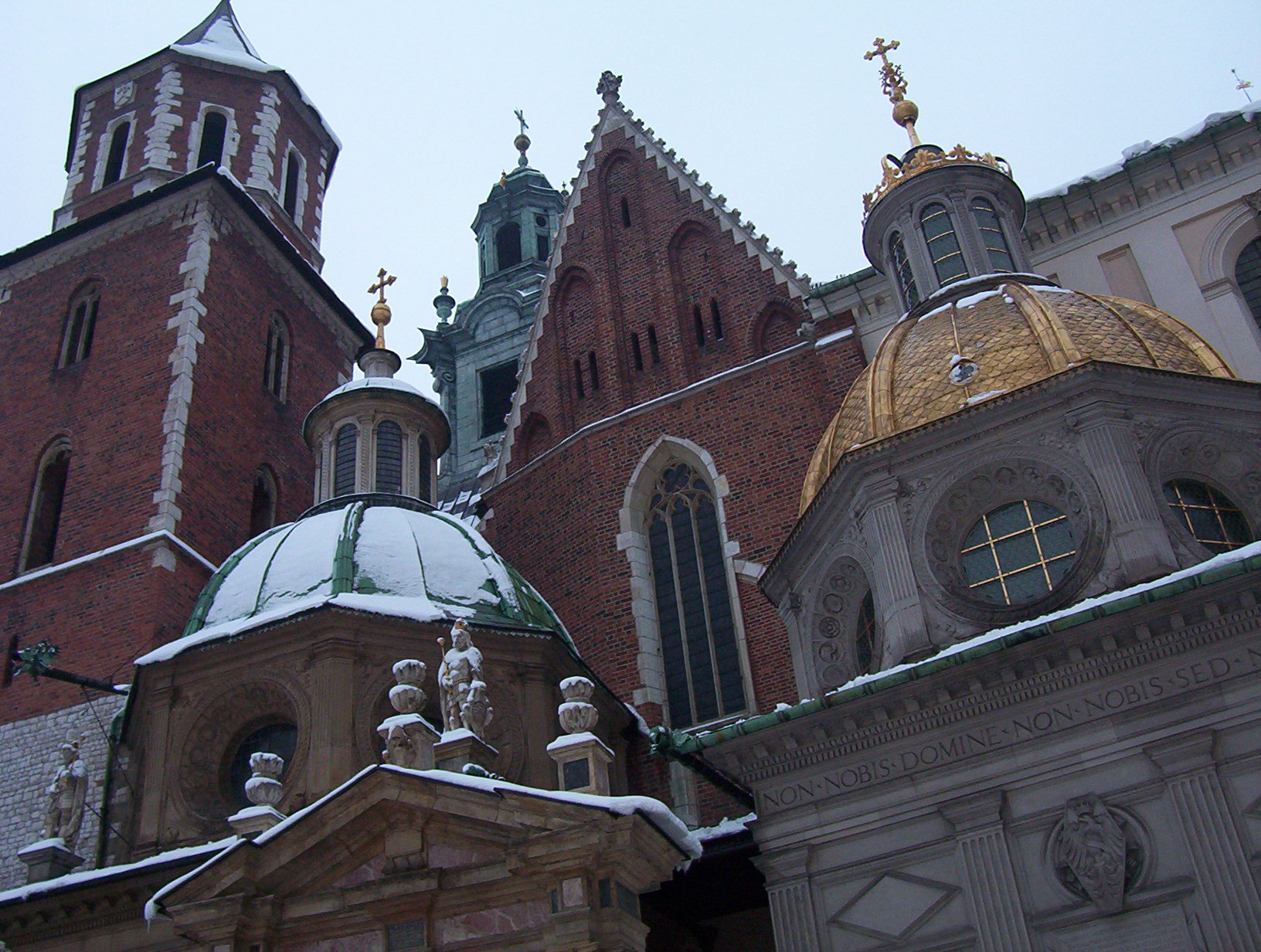 Close-up Wawelkatedraal (januari 2006).